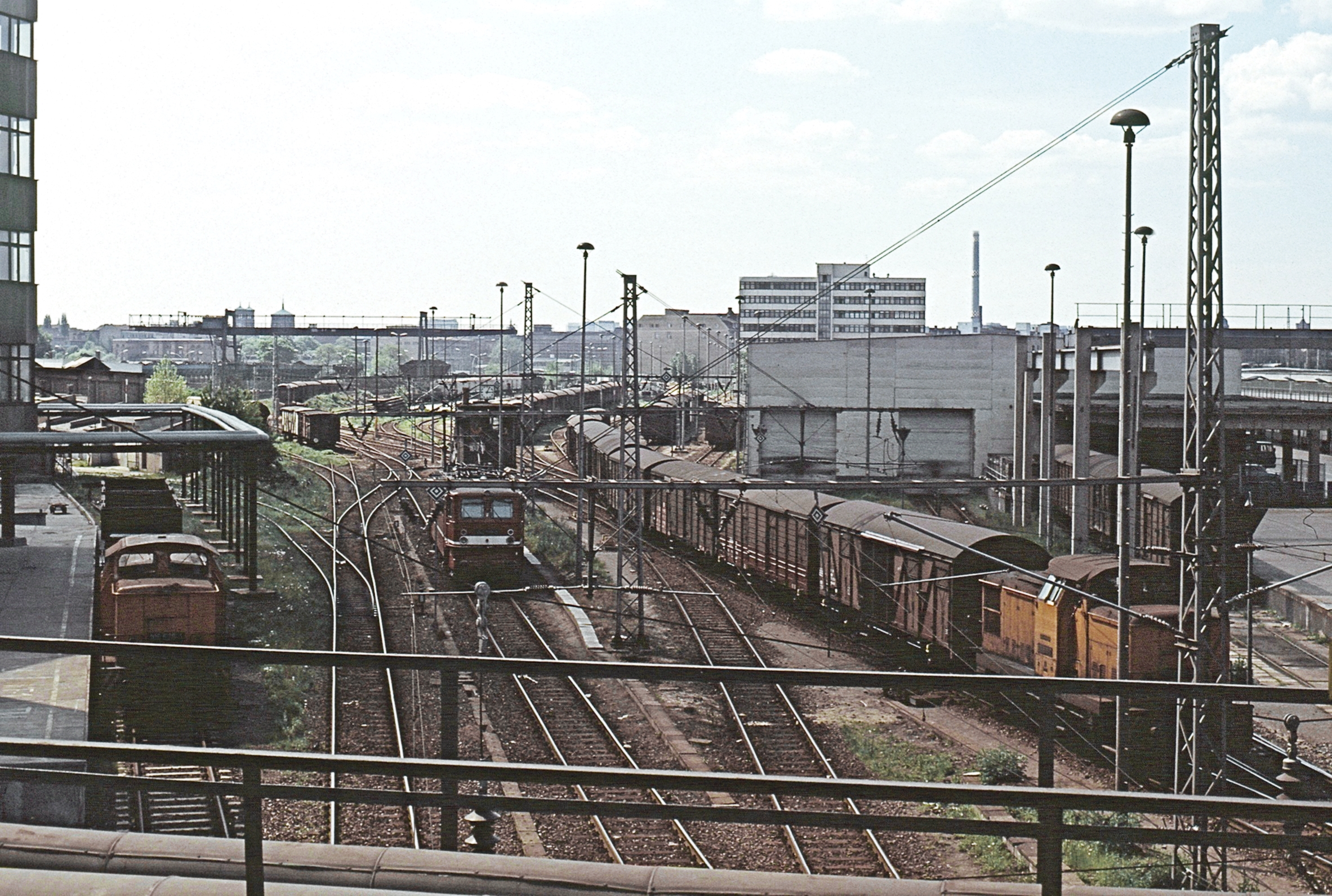 Güterbahnhof Berlin Ostbahnhof